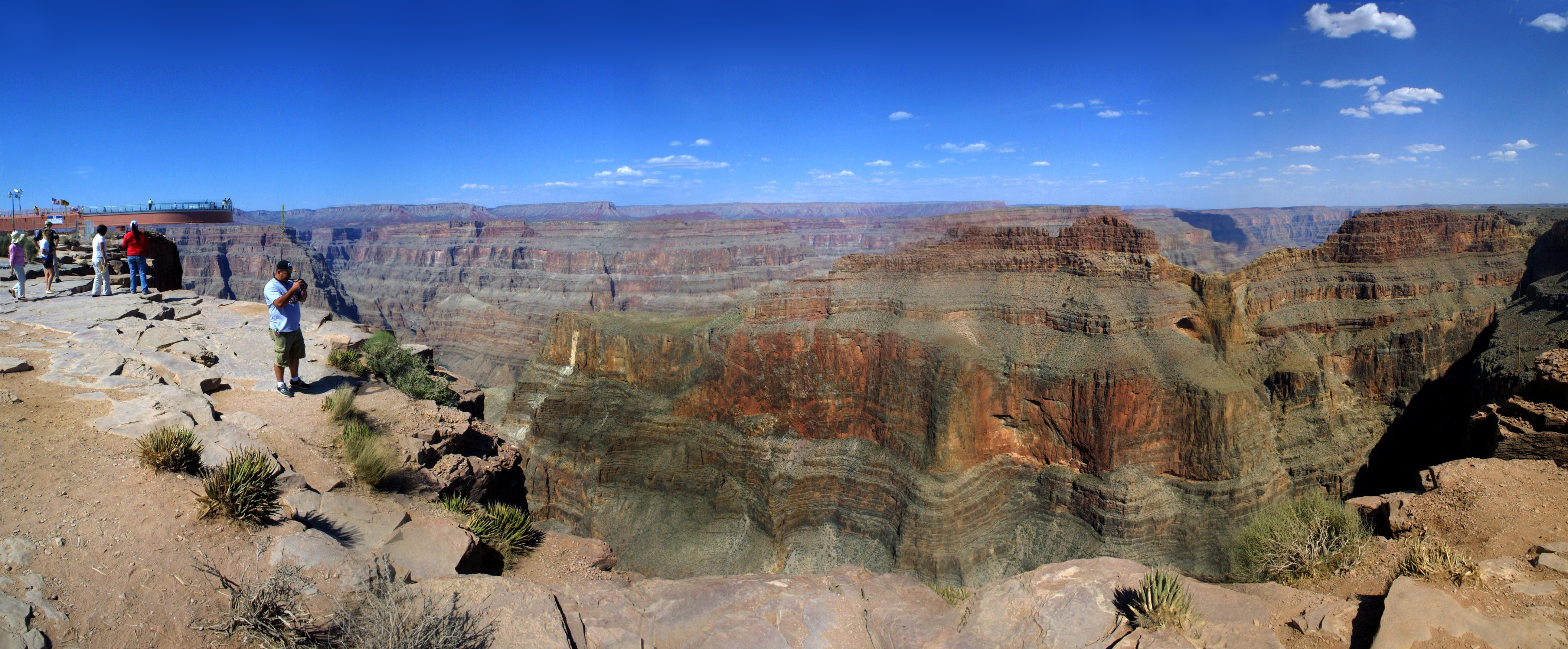 Aussicht direkt neben dem Skywalk.